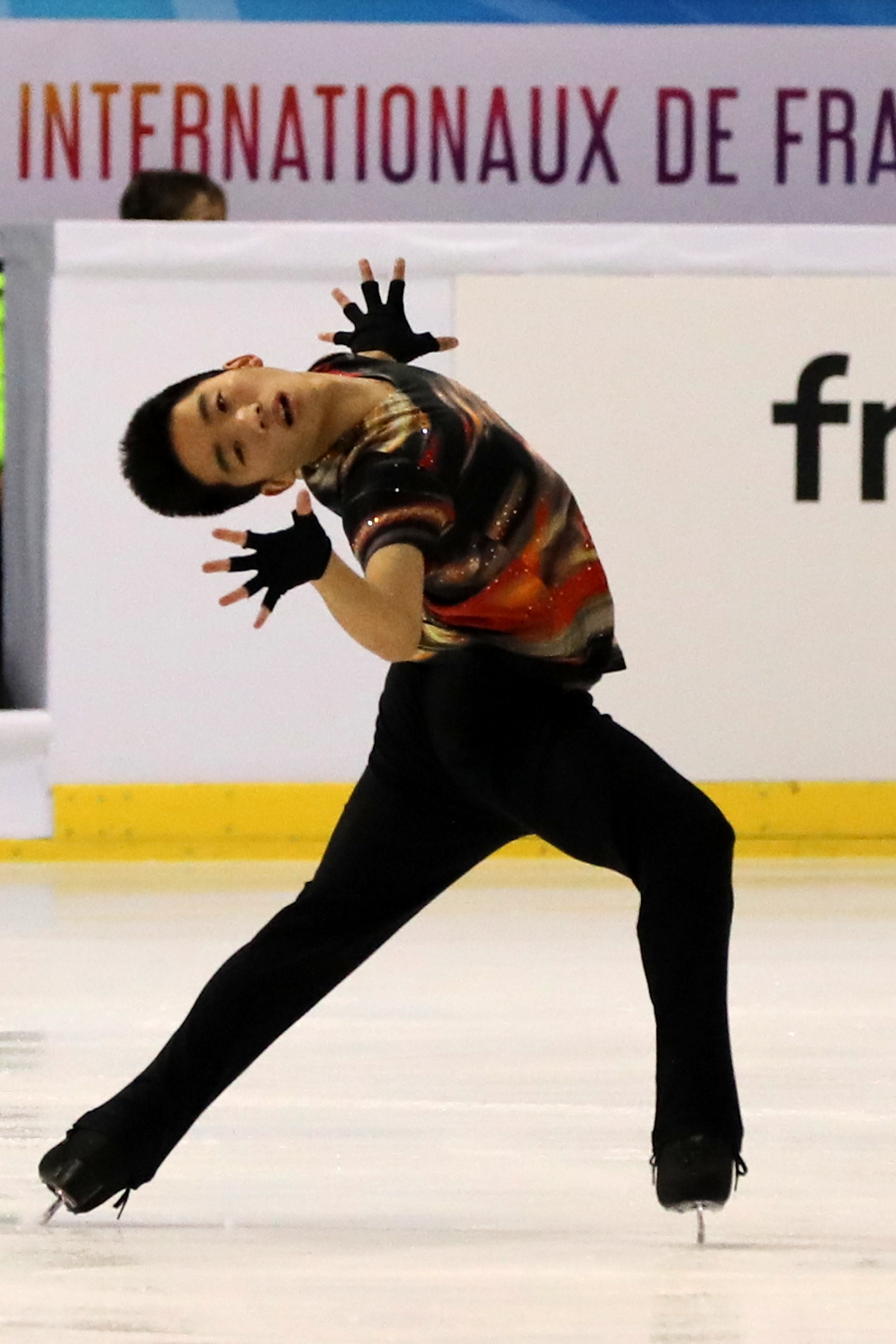 Tomoki Hiwatashi, programme court aux Internationaux de France 2019.